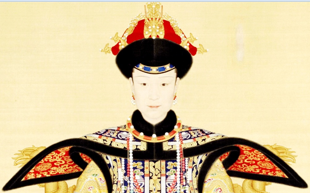 孝贤纯皇后朝服像局部